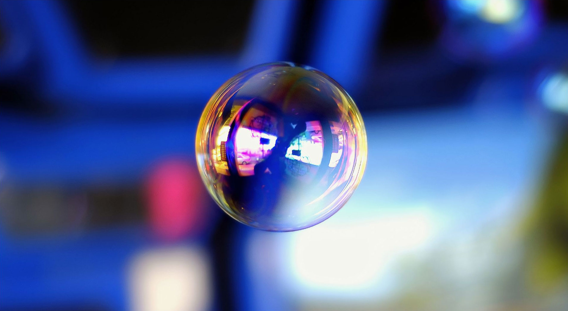 A soap bubble